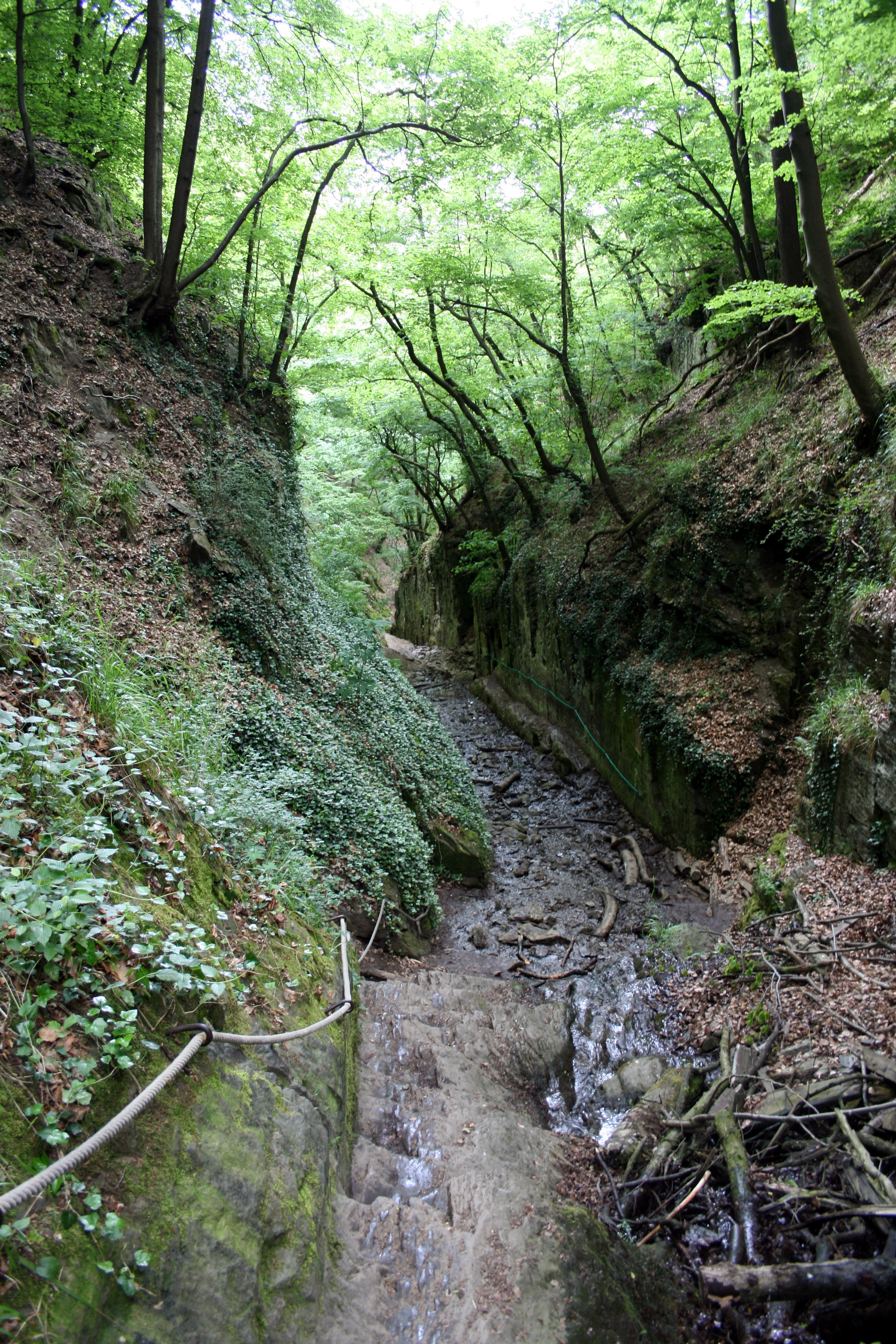 Ruppertsklamm in der Nähe von Lahnstein